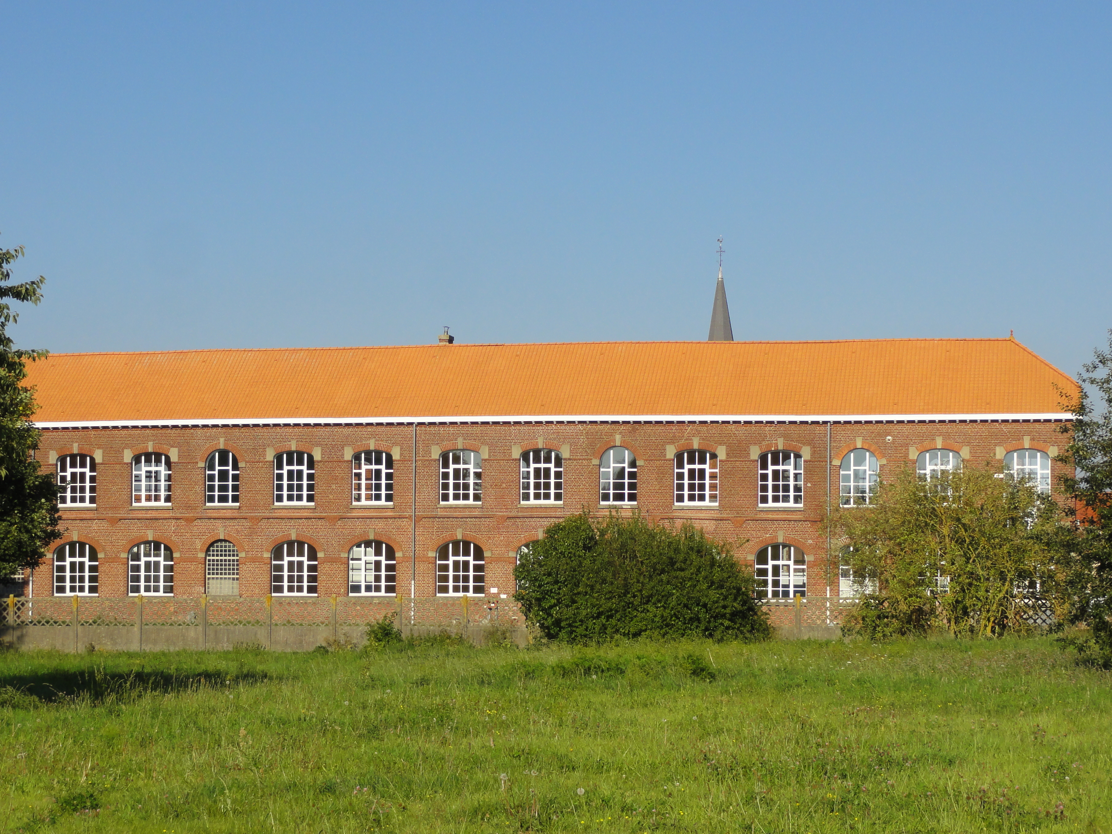 Écoles des cités de la fosse n° 6 - 6 bis - 6 ter de la Compagnie des mines de Bruay, Bruay-la-Buissière, Pas-de-Calais, Nord-Pas-de-Calais, France.